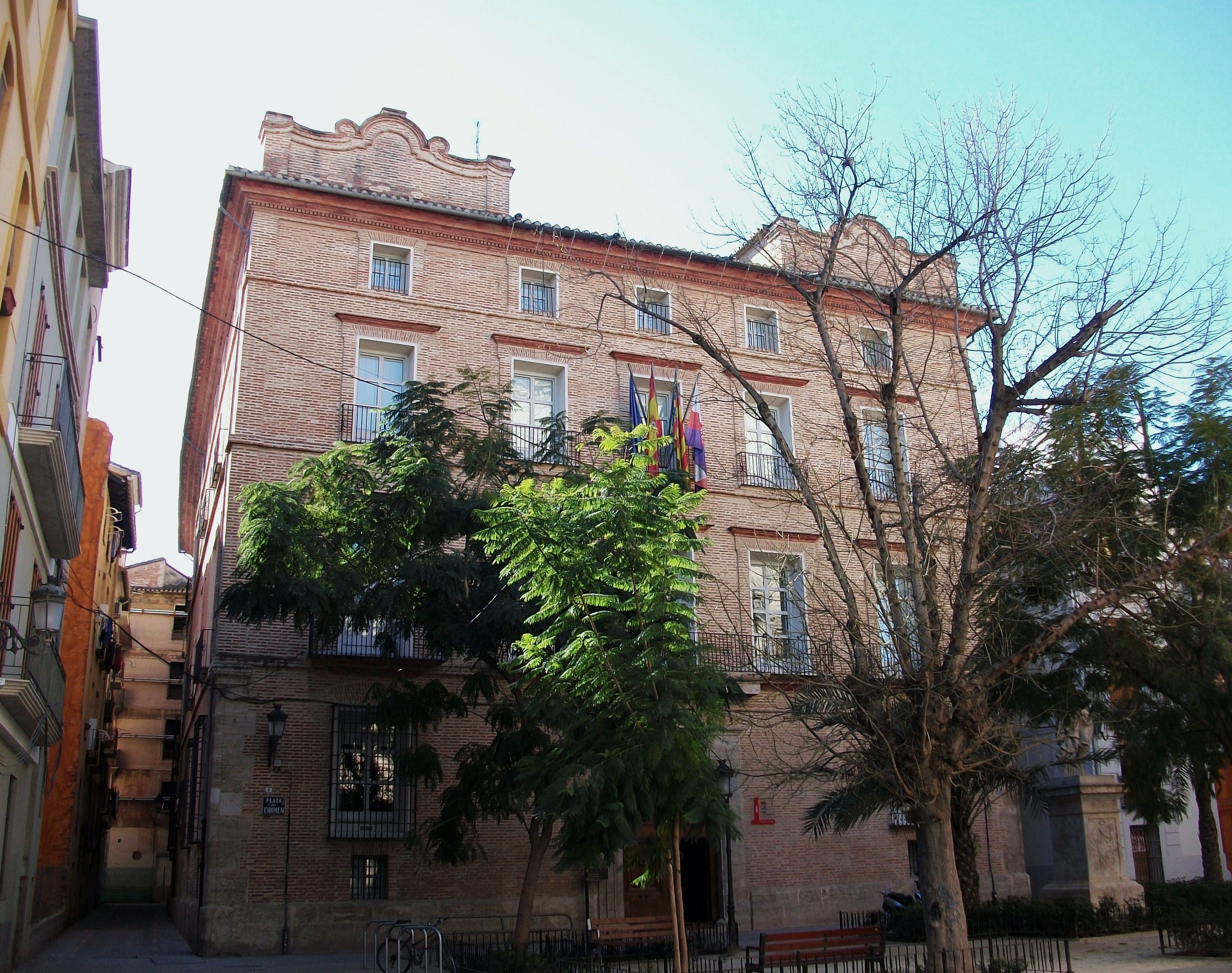 Palau de Pineda, el Carme, València.